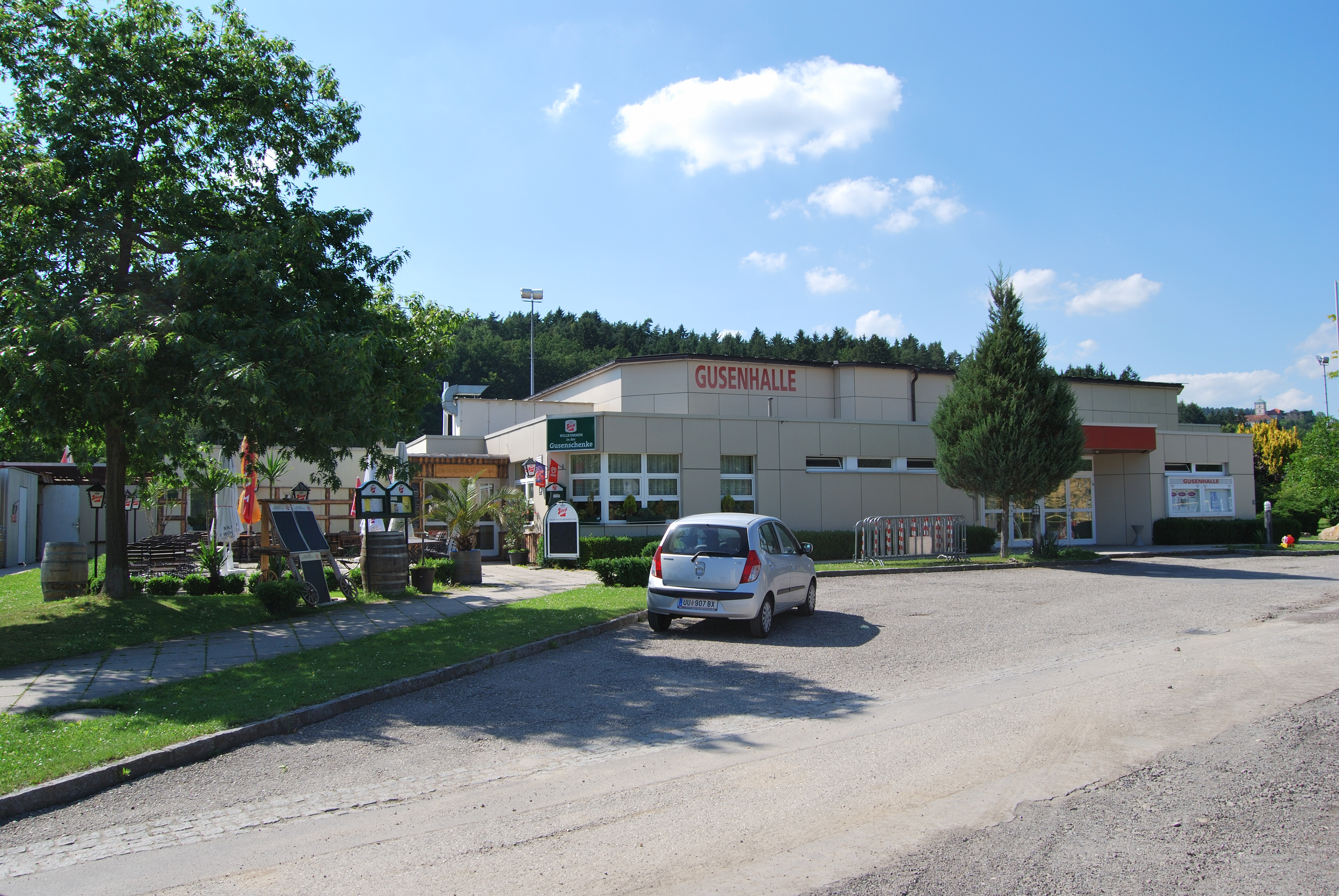 Die Gusenhalle ist ein Veranstaltungsort in Gallneukirchen.